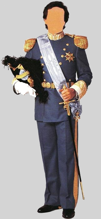 Bailli de l'Ordre constantinien de Saint-Georges